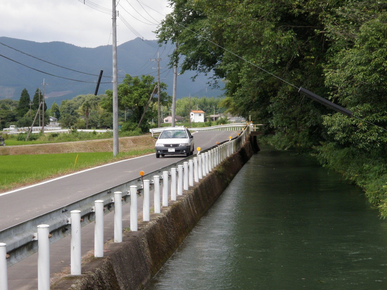 幸野溝 Kouno Waterway